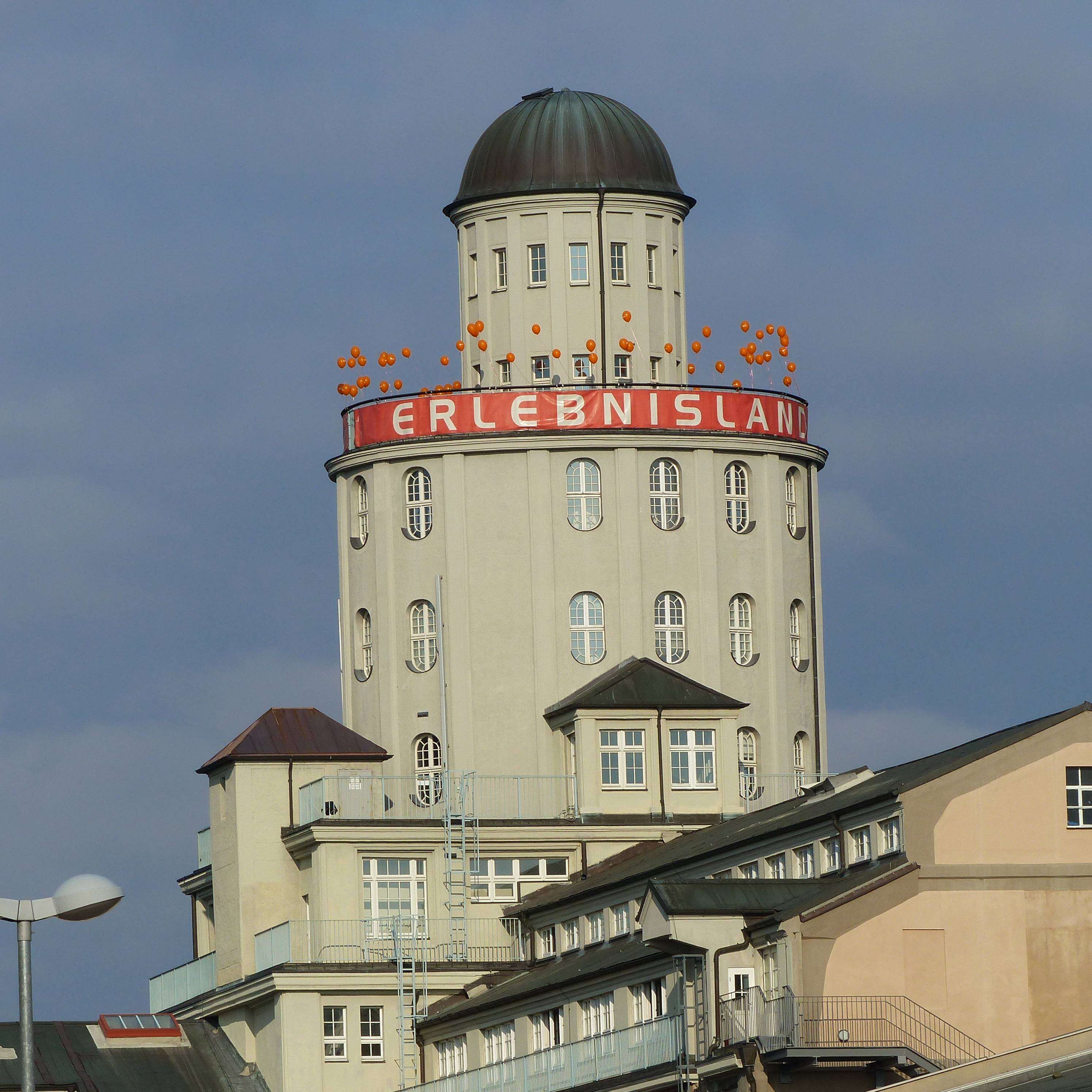 Blick auf den Ernemannturm der Technischen Sammlungen Dresden